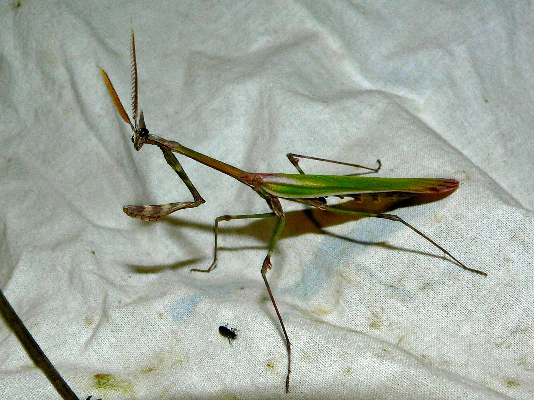 Salasc, Hérault, FRANCE